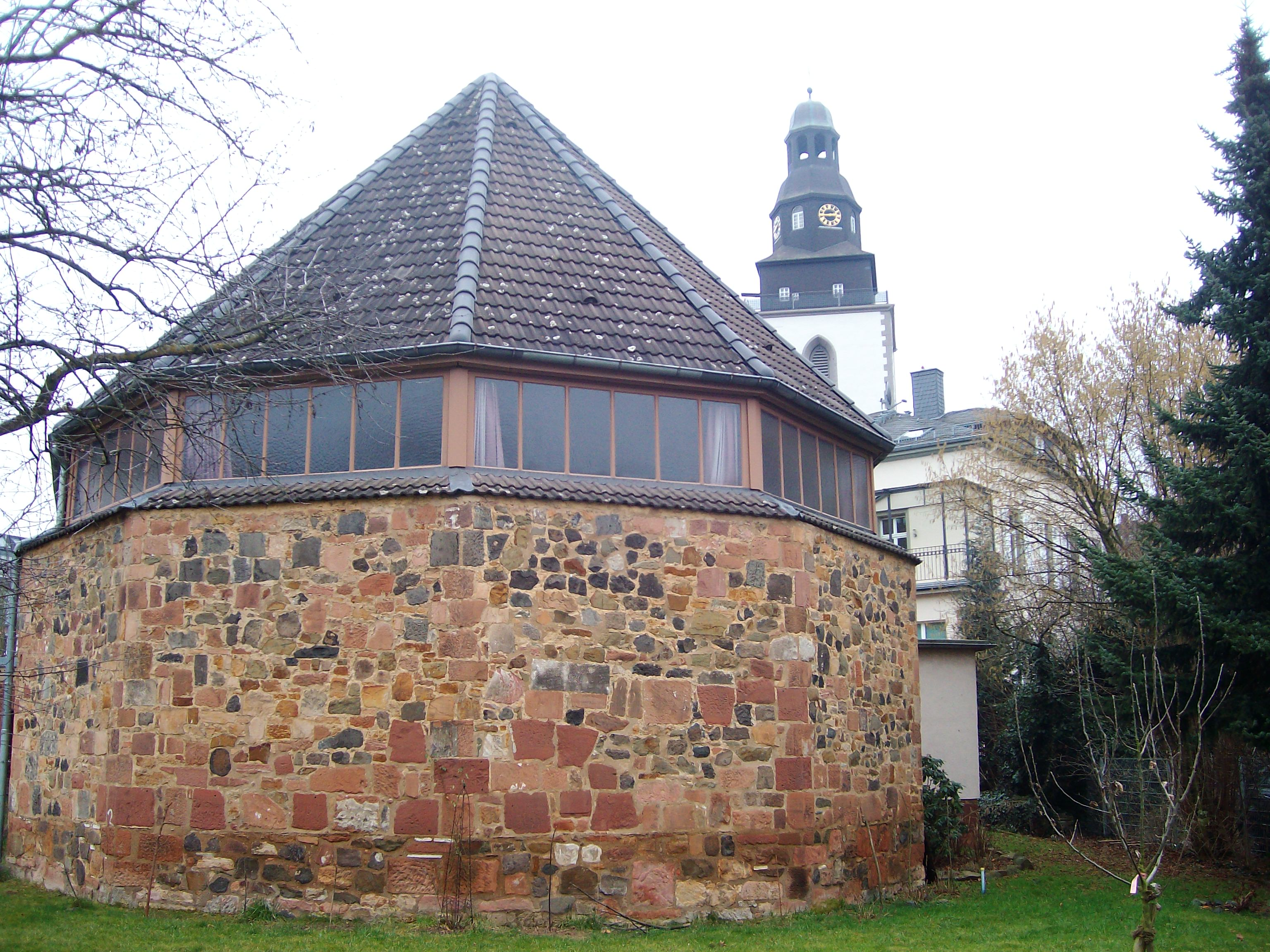 Chor der Pankratiuskapelle Gießen, Hessen, Deutschland